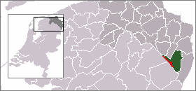 Locatie van de plaats Stadskanaal binnen de gelijknamige gemeente. Afbeelding gemaakt door Marco Roepers op basis van kaart vervaardigd door User:Mtcv. Publiek domein